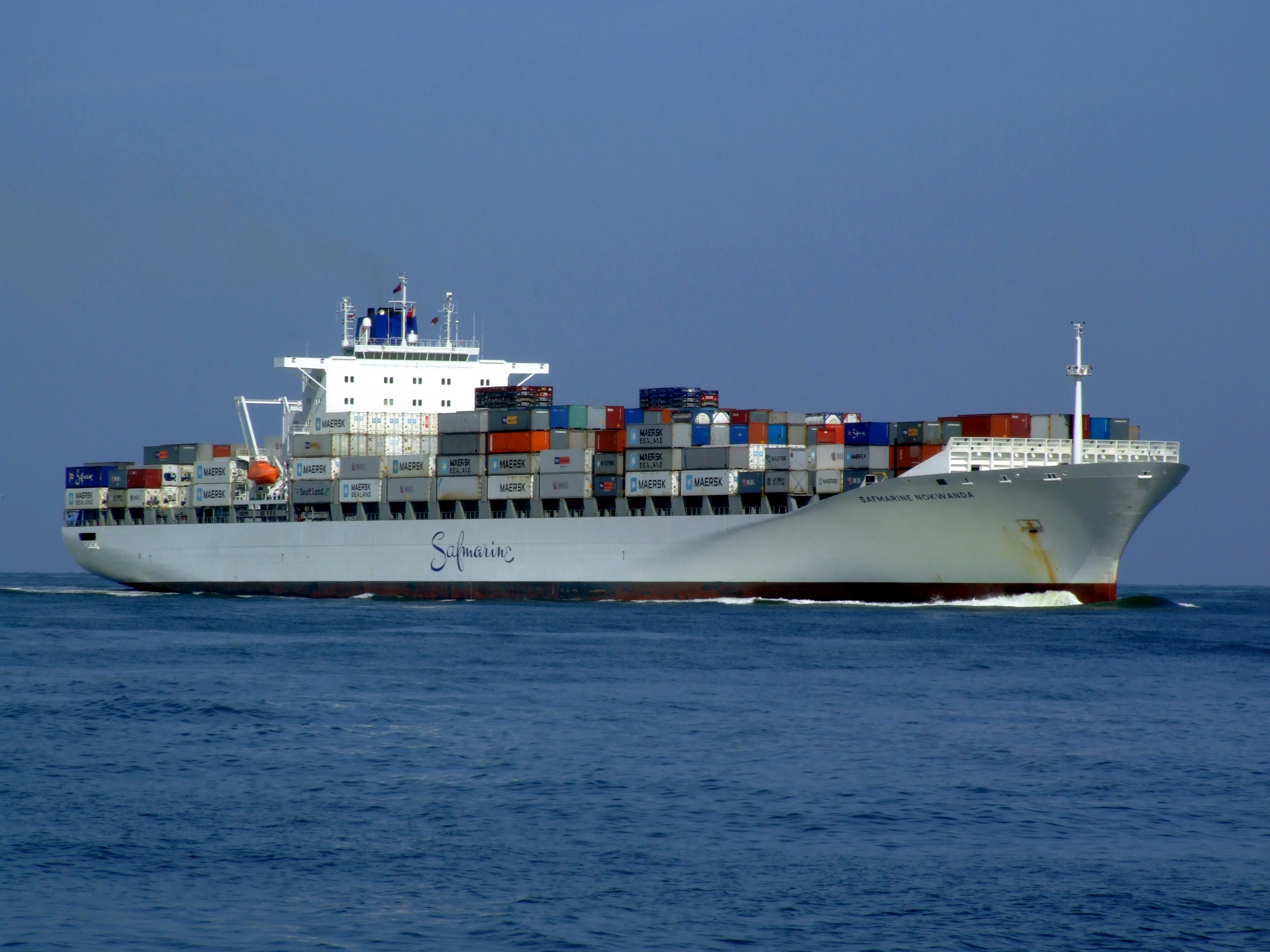 Safmarine Nokwanda - IMO 9294393